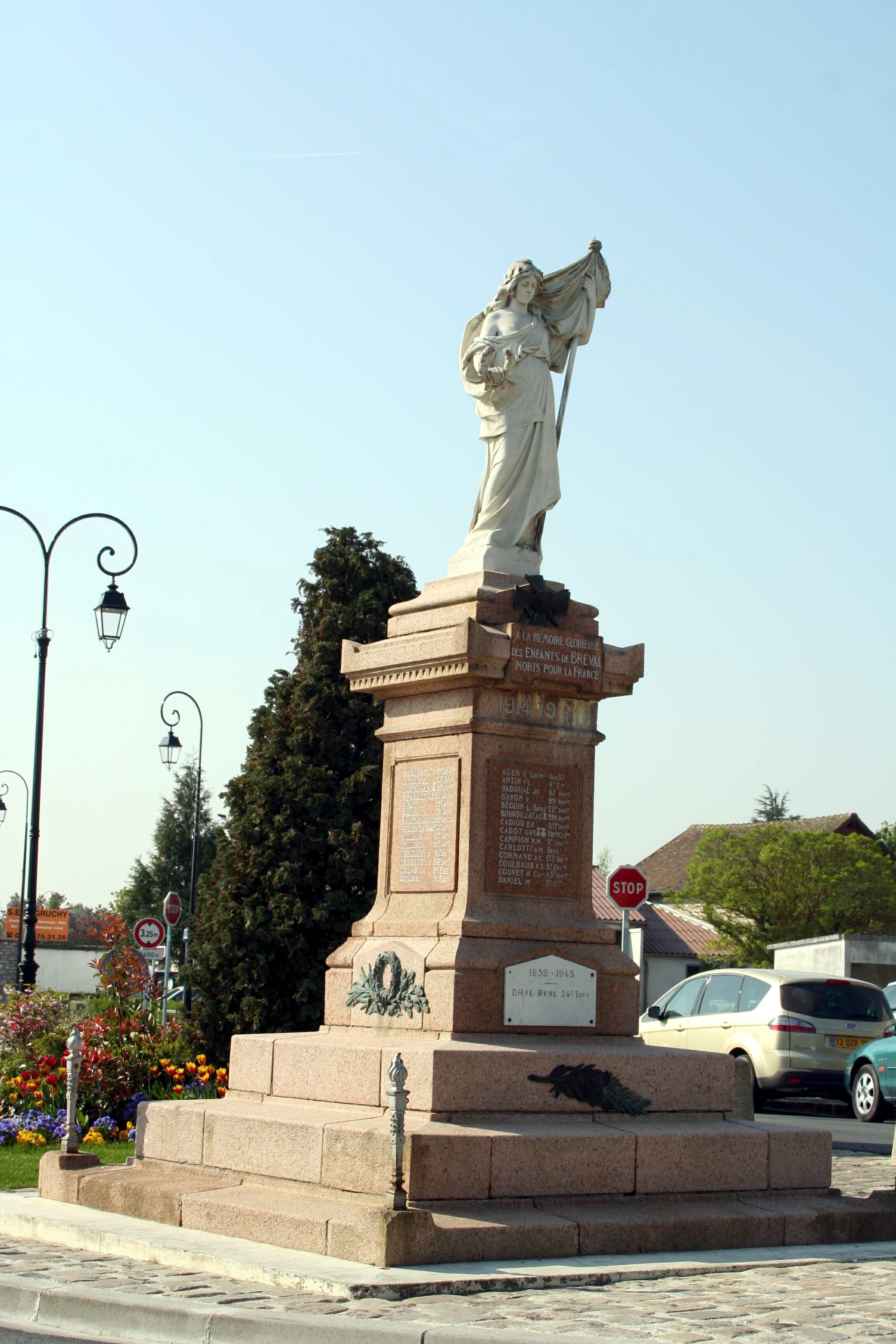 Monuments aux morts de Bréval - Yvelines (France)